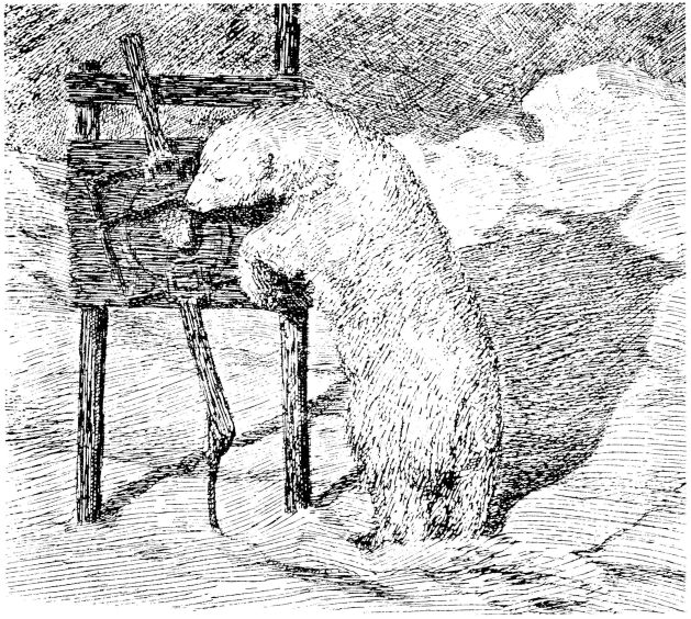 Illustration for Fridtjof Nansens Fram over Polhavet : den norske polarfærd 1893-1896, drawn by Halfdan Egedius. Sverdrups skuffelse. «– den glante en stund på den deilige spekebiten.»